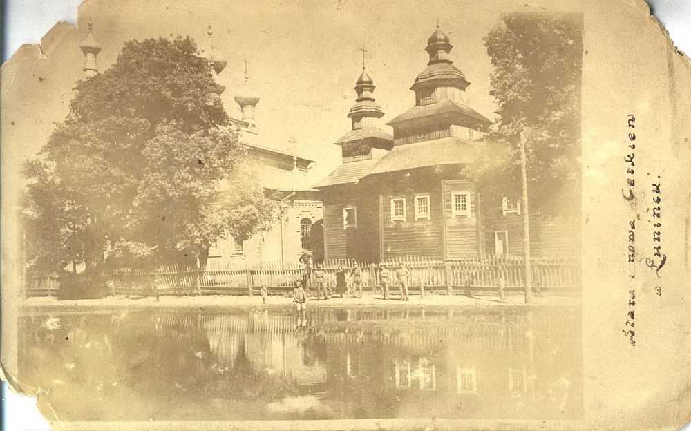 Беларуская (тарашкевіца): Лунінец (Łuniniec), вуліца Царкоўная (vulica Carkoŭnaja). Новая царква-мураўёўка і старая царква, помнік традыцыйнага дойлідзтва